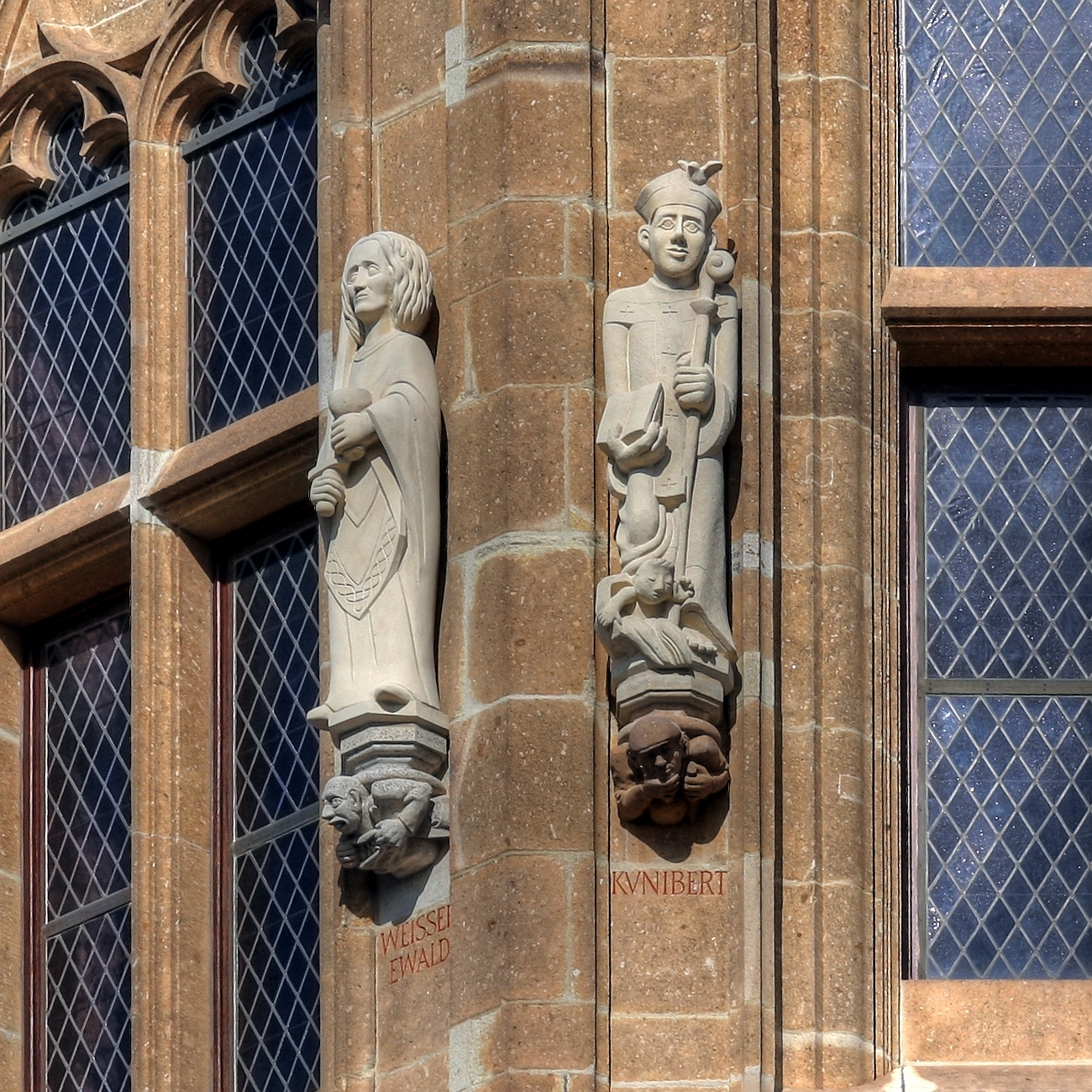 Rathausturm Köln mit den Figuren des Kunibert von Köln, weißer Ewald Details zu der Statue: Bildhauer der Ewald-Statue: Hans-Otto Lohrengel Bildhauer der Kunibert-Statue: Majka Wichner Details zu der Konsole: Thema der Konsole unter der Ewald-Statue: „Geldsäckelmann“. Bildhauer: Herbert Rausch Thema der Konsole unter der Kunibert-Statue: „Herbert Rausch“. Bildhauer: Herbert Rausch